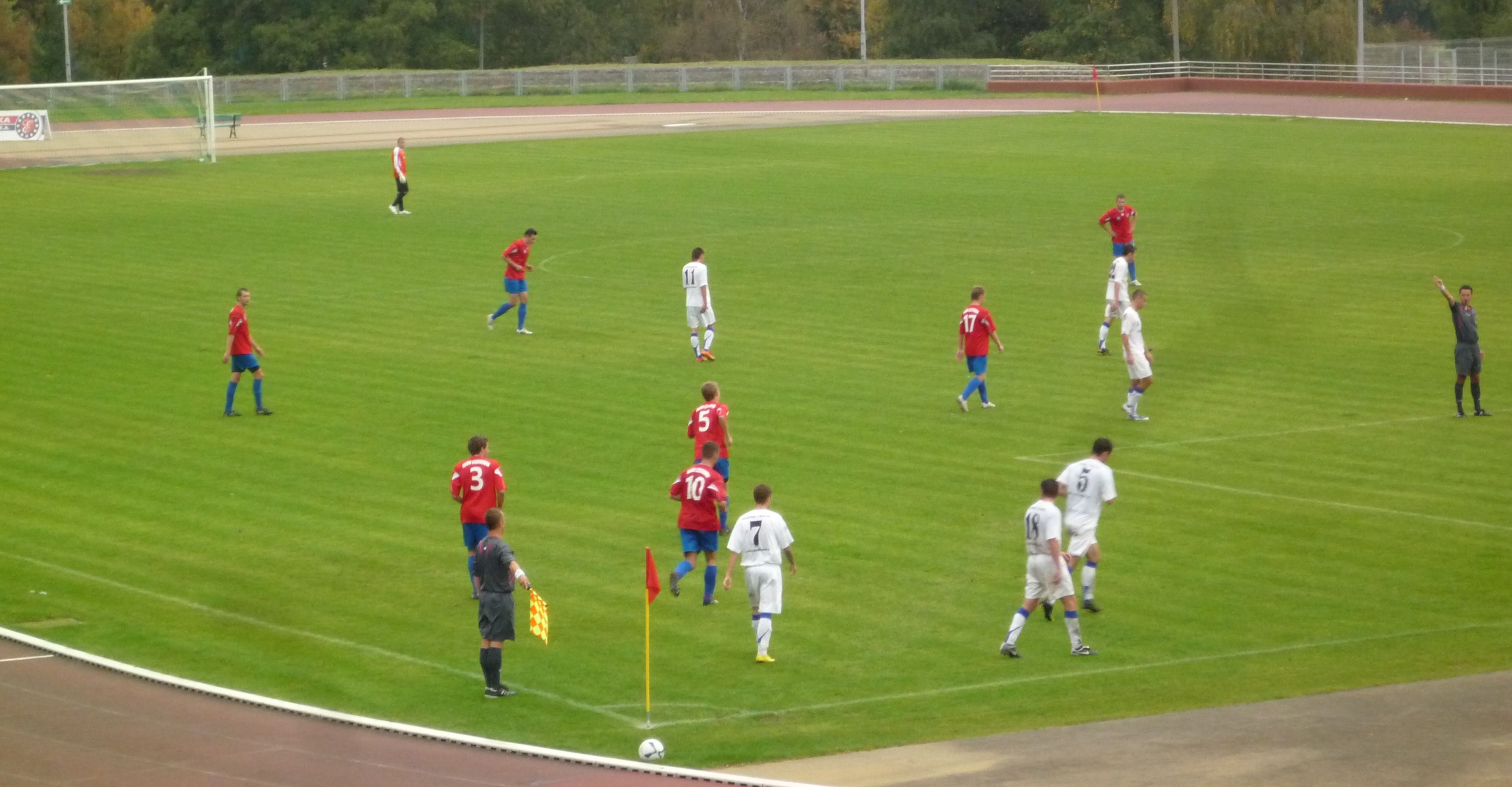 Mecz II ligi zachodniej, Polonia Słubice - Raków Częstochowa na stadionie SOSiR w Słubicach.